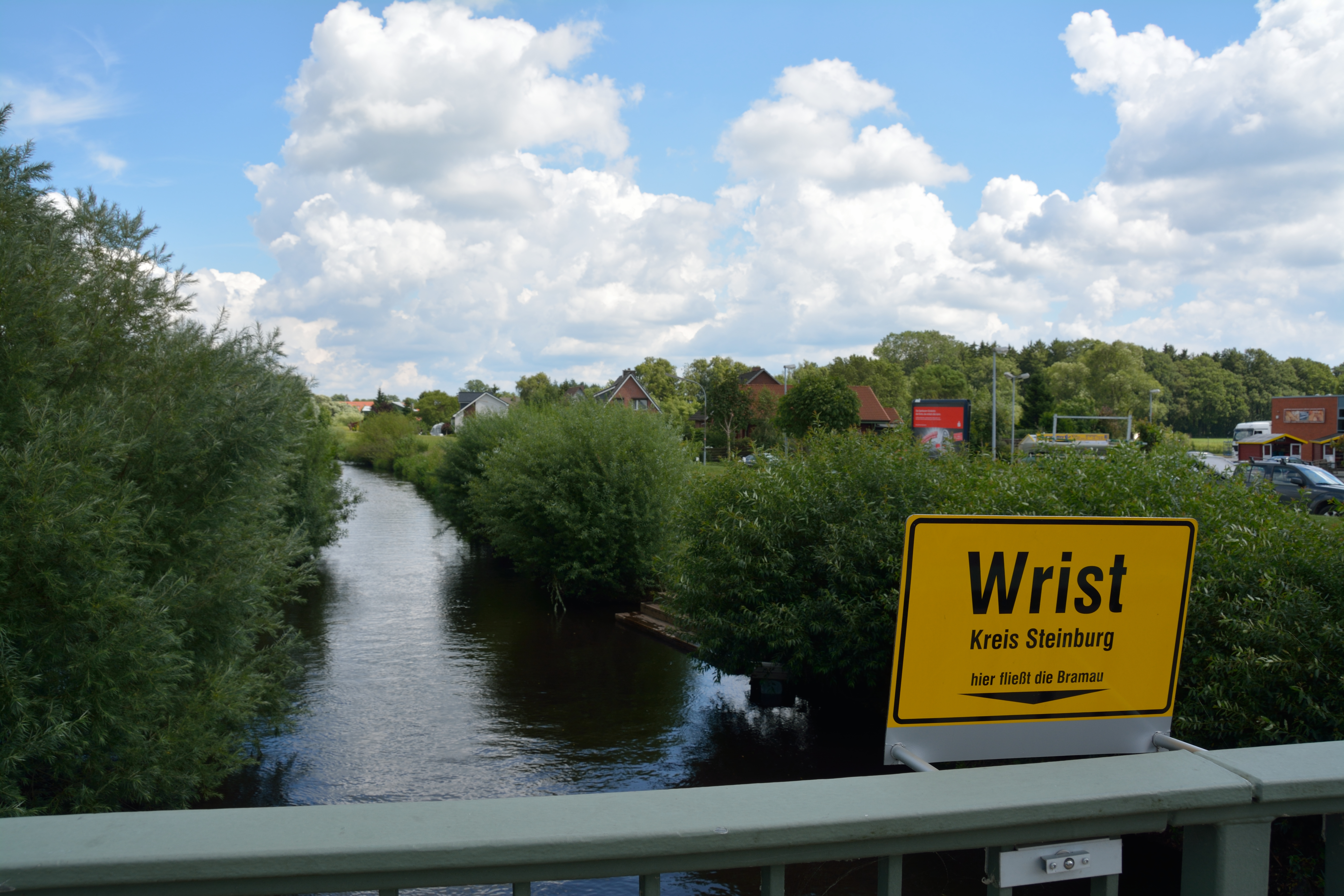 Wrist, die Bramau